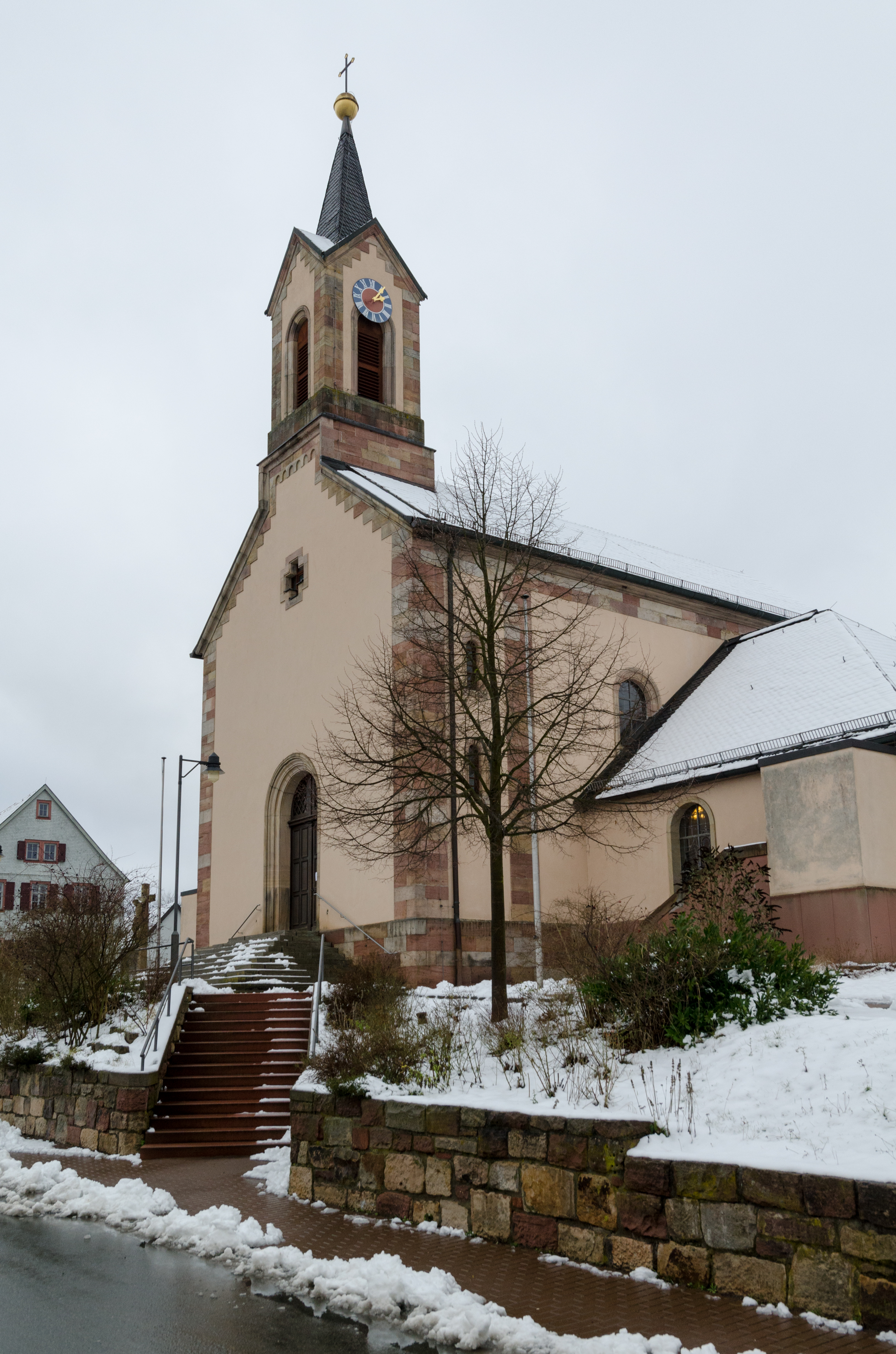 Burkardroth, Gefäll, Katholische Filialkirche St. Antonius von Padua